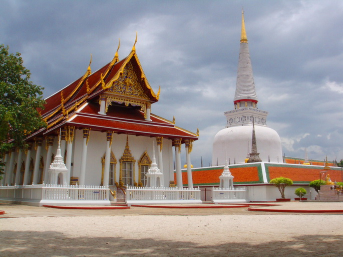 วัดพระบรมธาตุวรมหาวิหาร